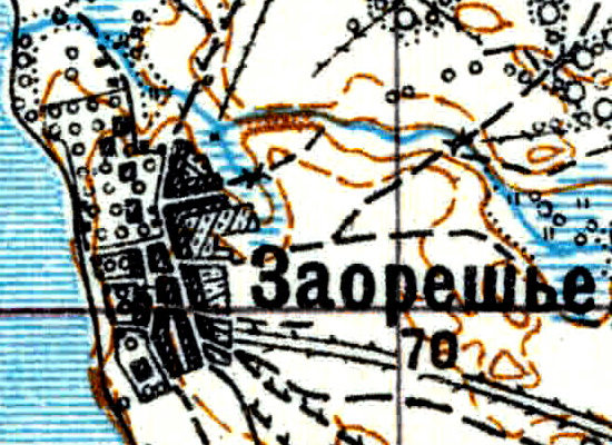 Топографическая карта Ленинградской области, квадрат Vc-29 (Батецкая), деревня Заорешье